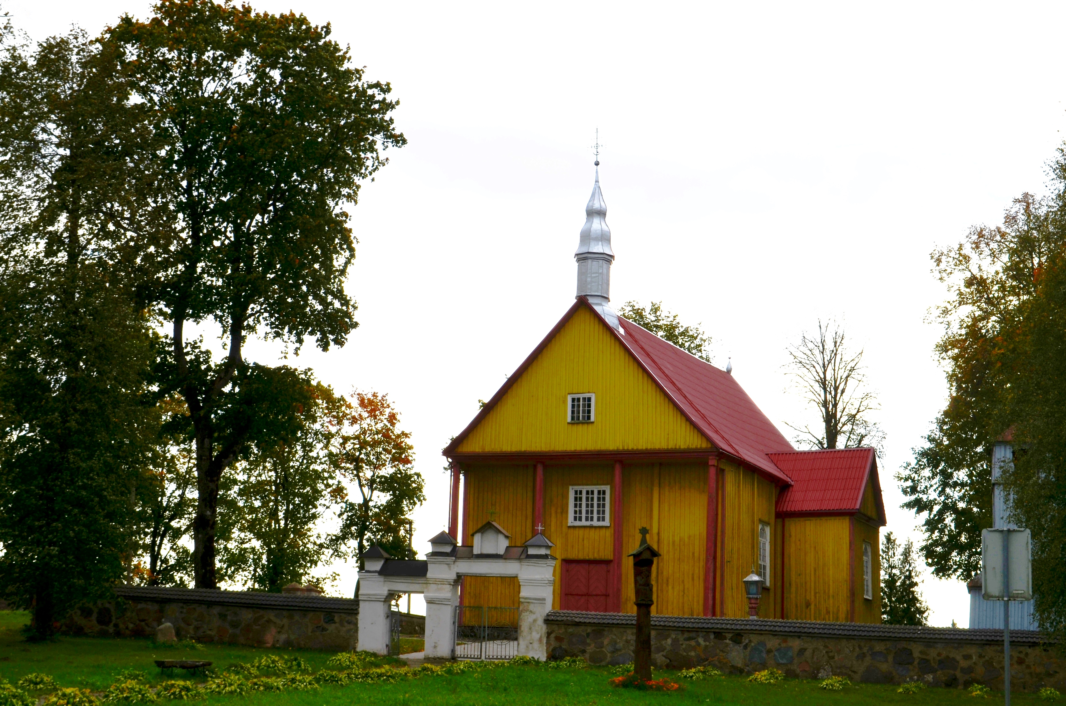 Karklėnų bažnyčia, Kelmės raj.